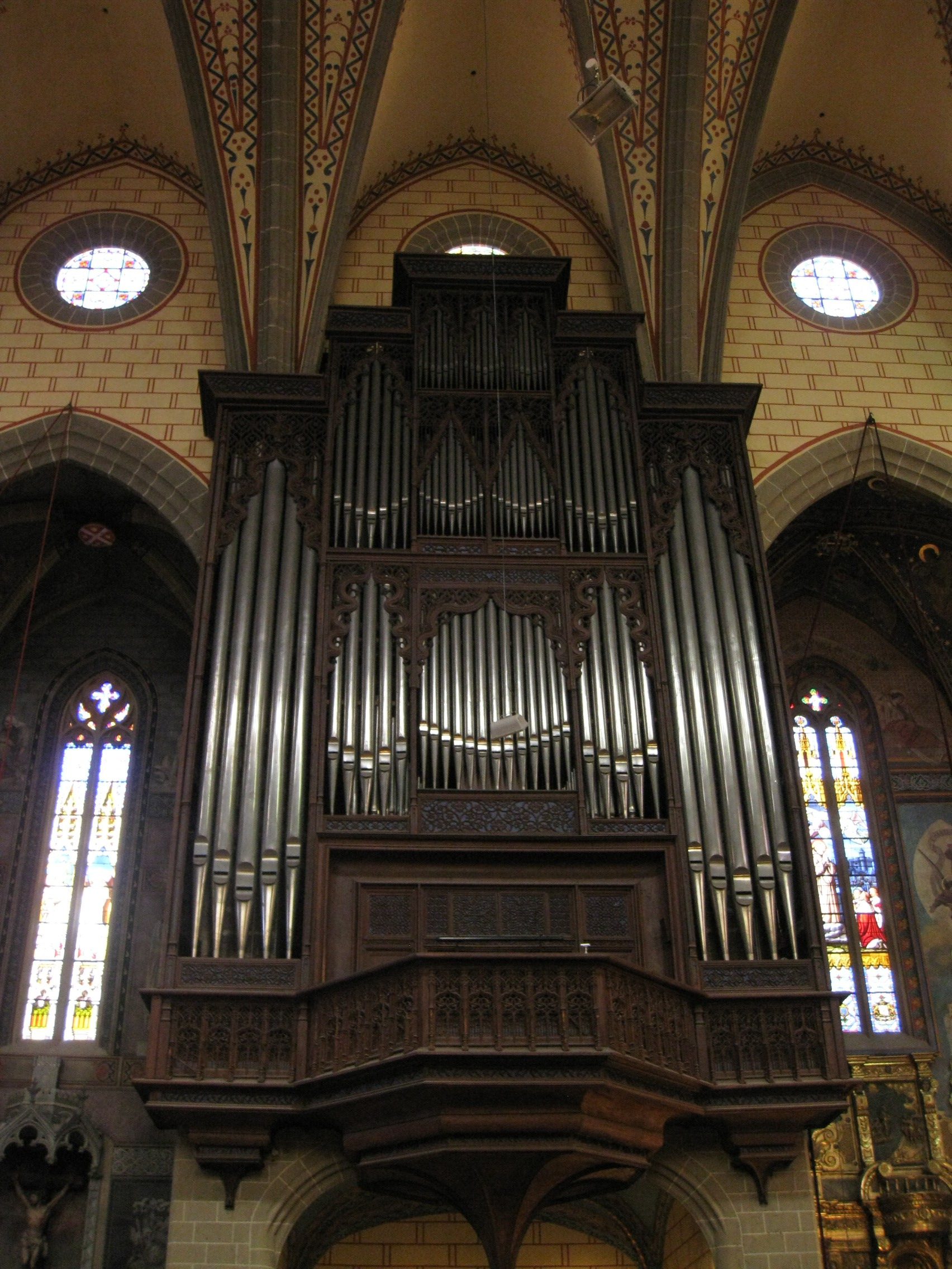 Catedral de Perpinyà, l'orgue: Buffet du 15e siècle, classé Monument Historique depuis le 25-02-1899, instrument d'Aristide Cavaillé-Coll de 1858 classé depuis le 01-07-1988.